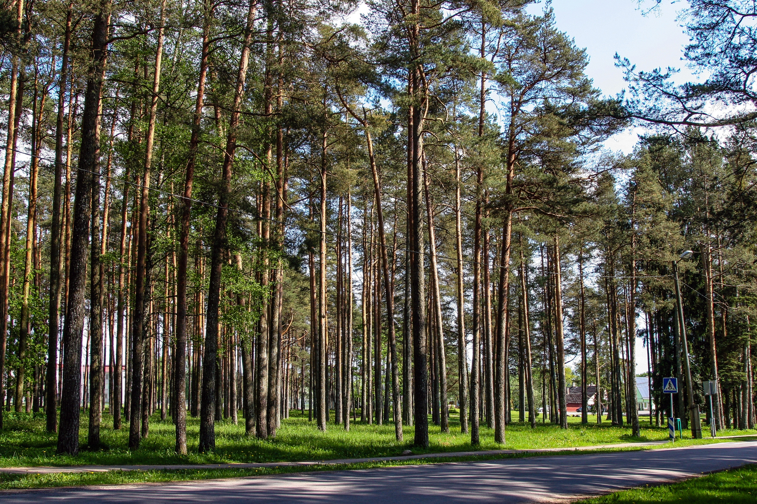 Kapa männik koos puiesteega